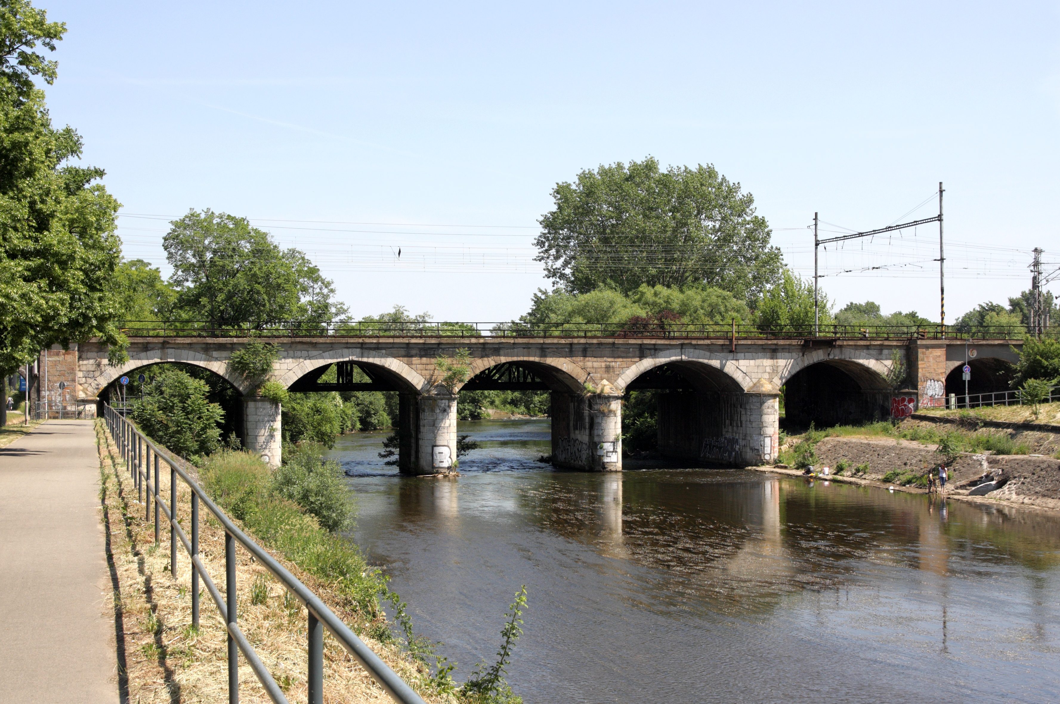 Brno - viadukt přes Svratku.